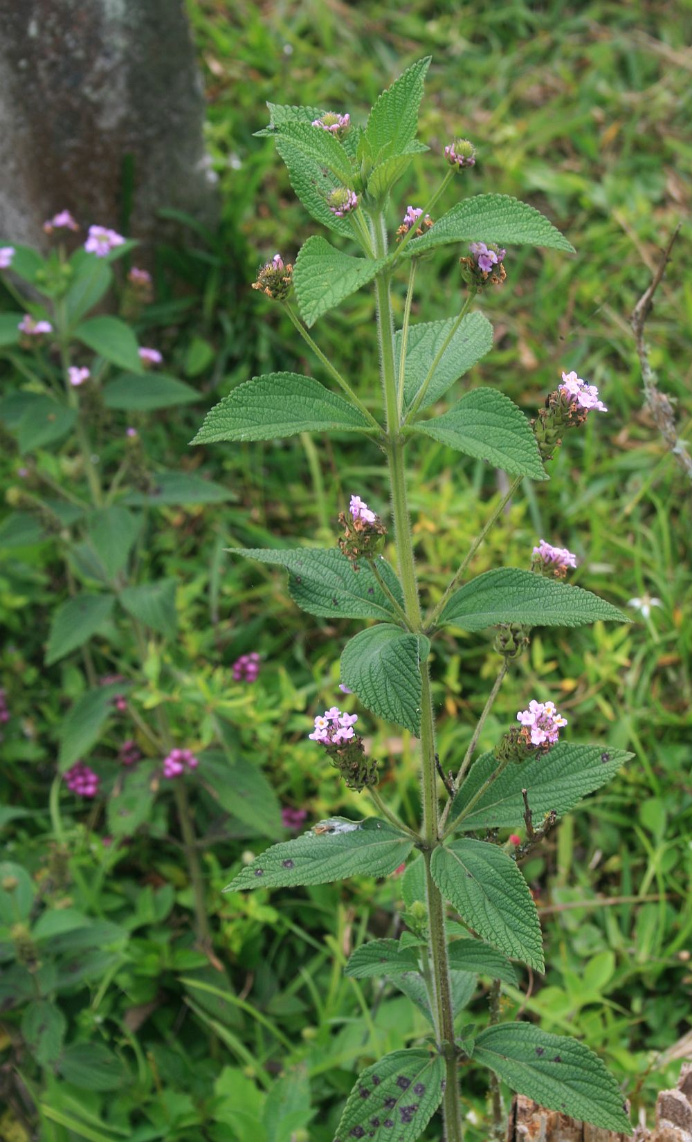 Lantana trifolia, Eisenkrautgewächse (Verbenaceae) – Kolumbien/Colombia: Dpto. Huila, El Tablón, ca. 1,9 km NNW San Agustín, ca. 1670–1680 m